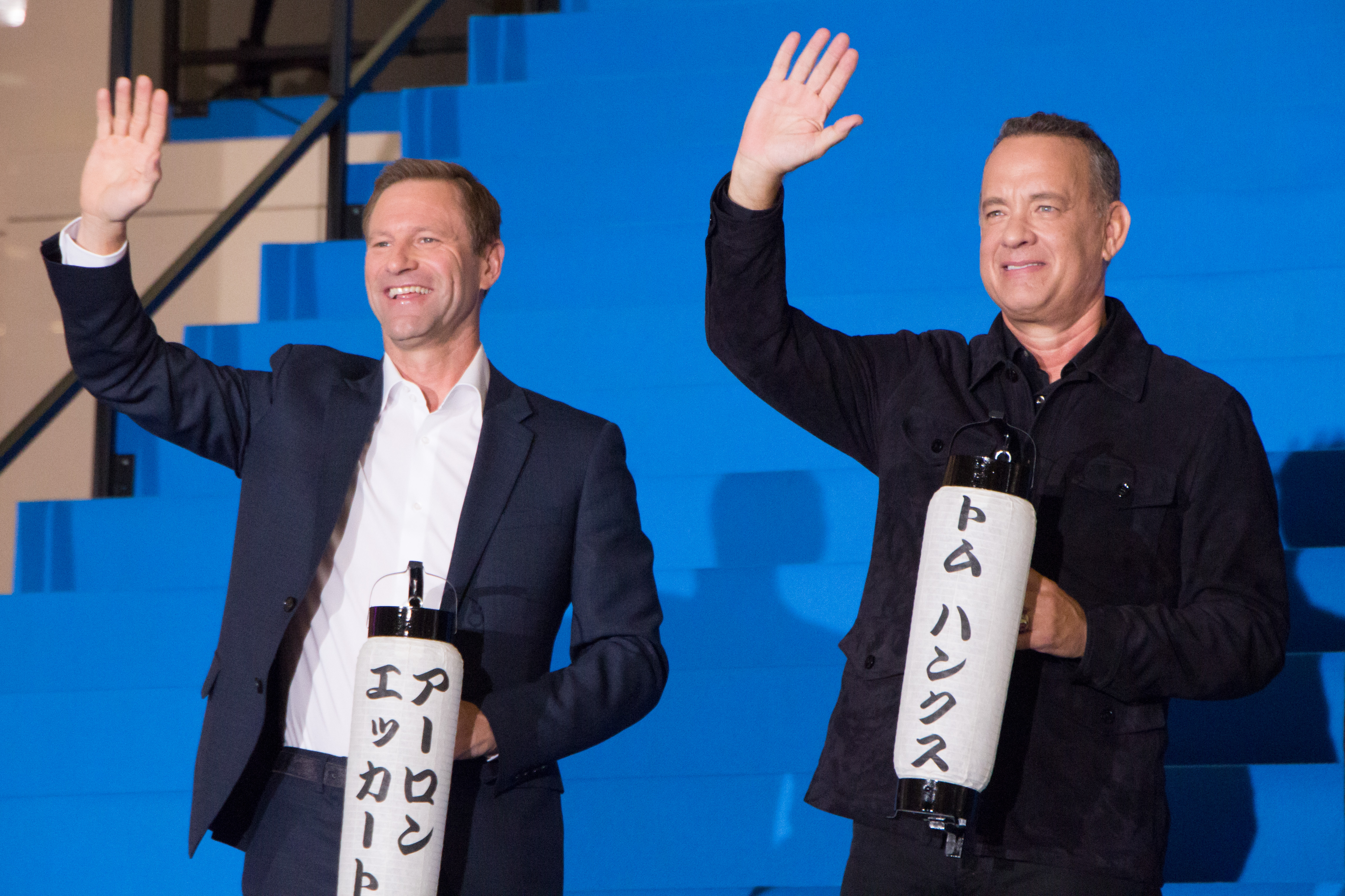 ハドソン川の奇跡 ジャパン・プレミア レッドカーペット トム・ハンクス アーロン・エッカート